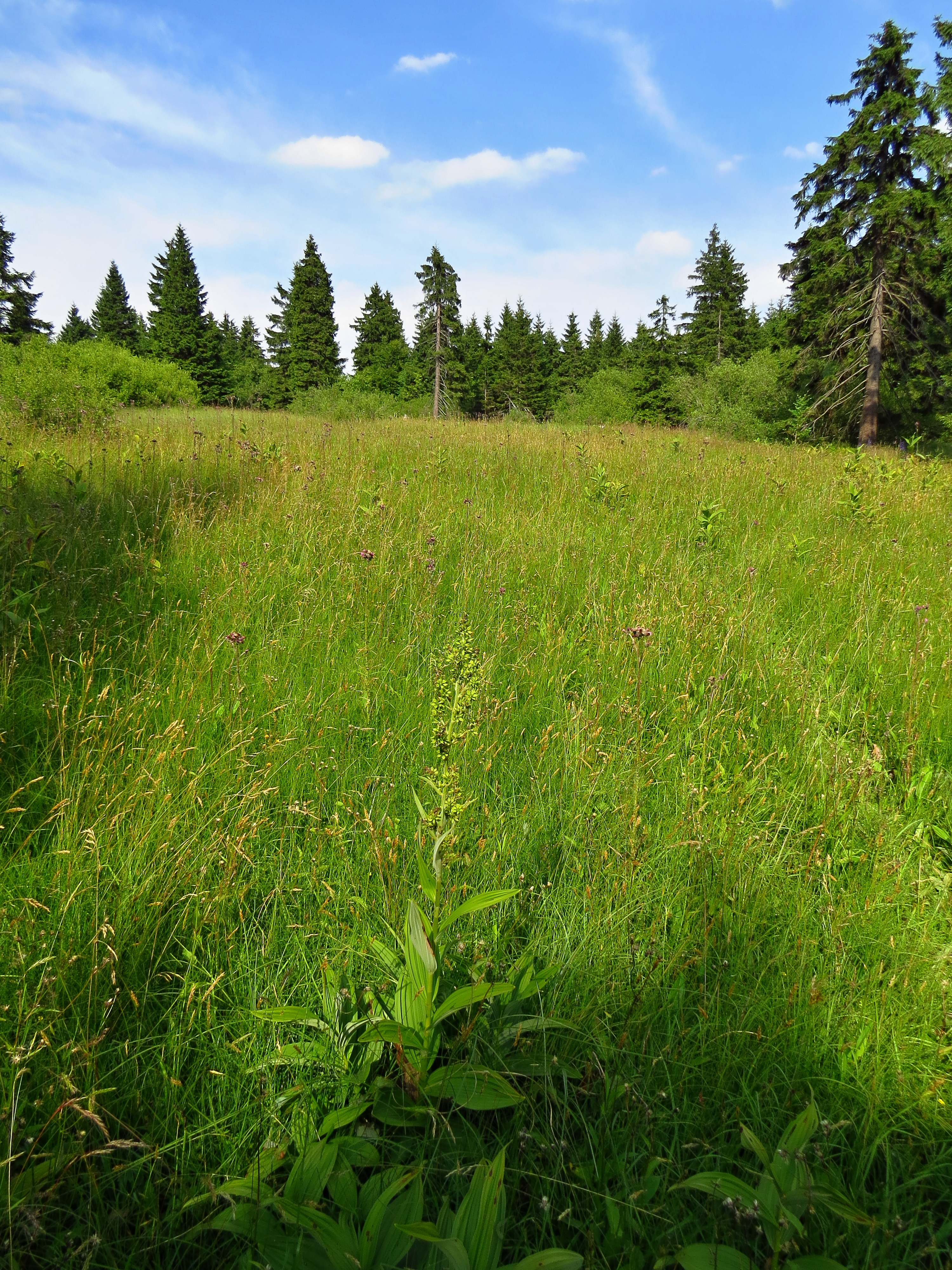 Project: Chráněná území